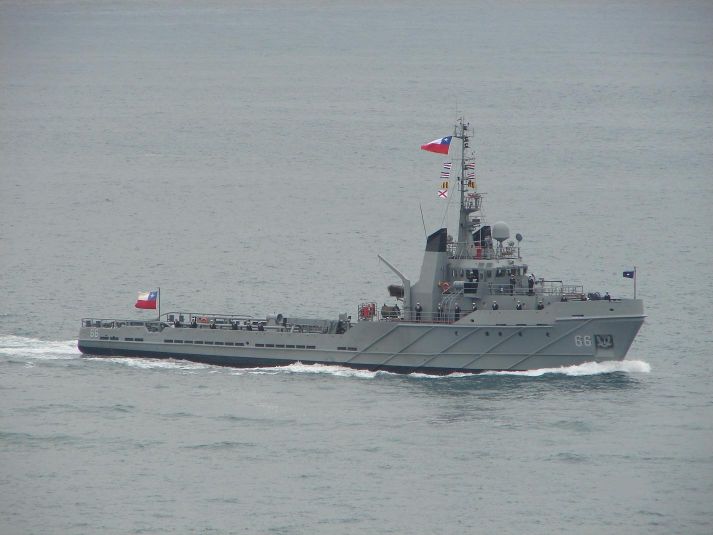 Remolcador de Flota Galvarino ATF-66,EX Maersk Traveller